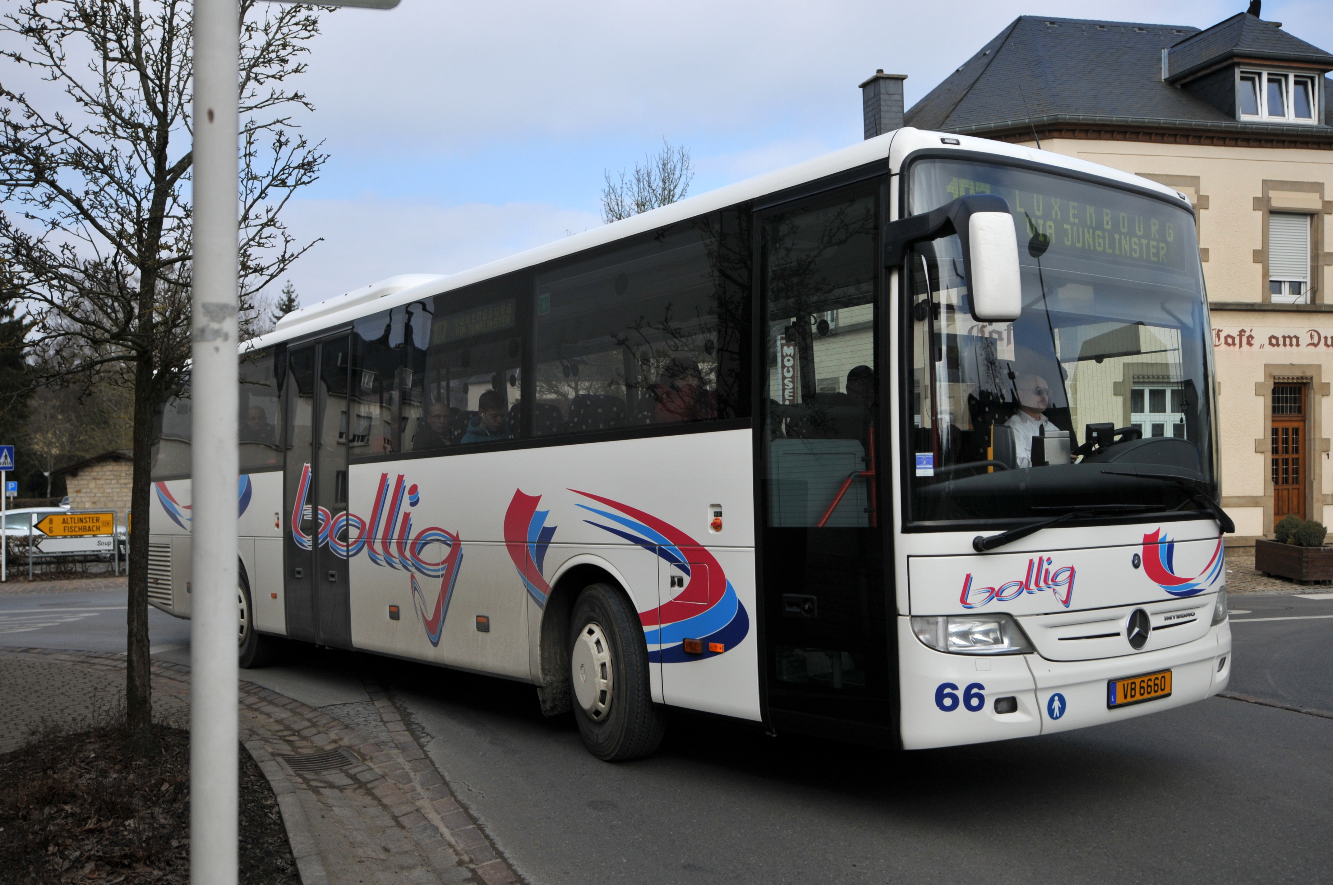 De Linnjebus vum Bollig zu Hiefenech "op der Strooss".